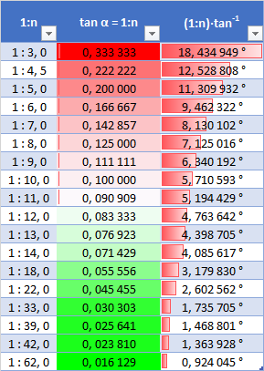 Pārmiju krusteņa marku stāvuma tabula (precizēta)